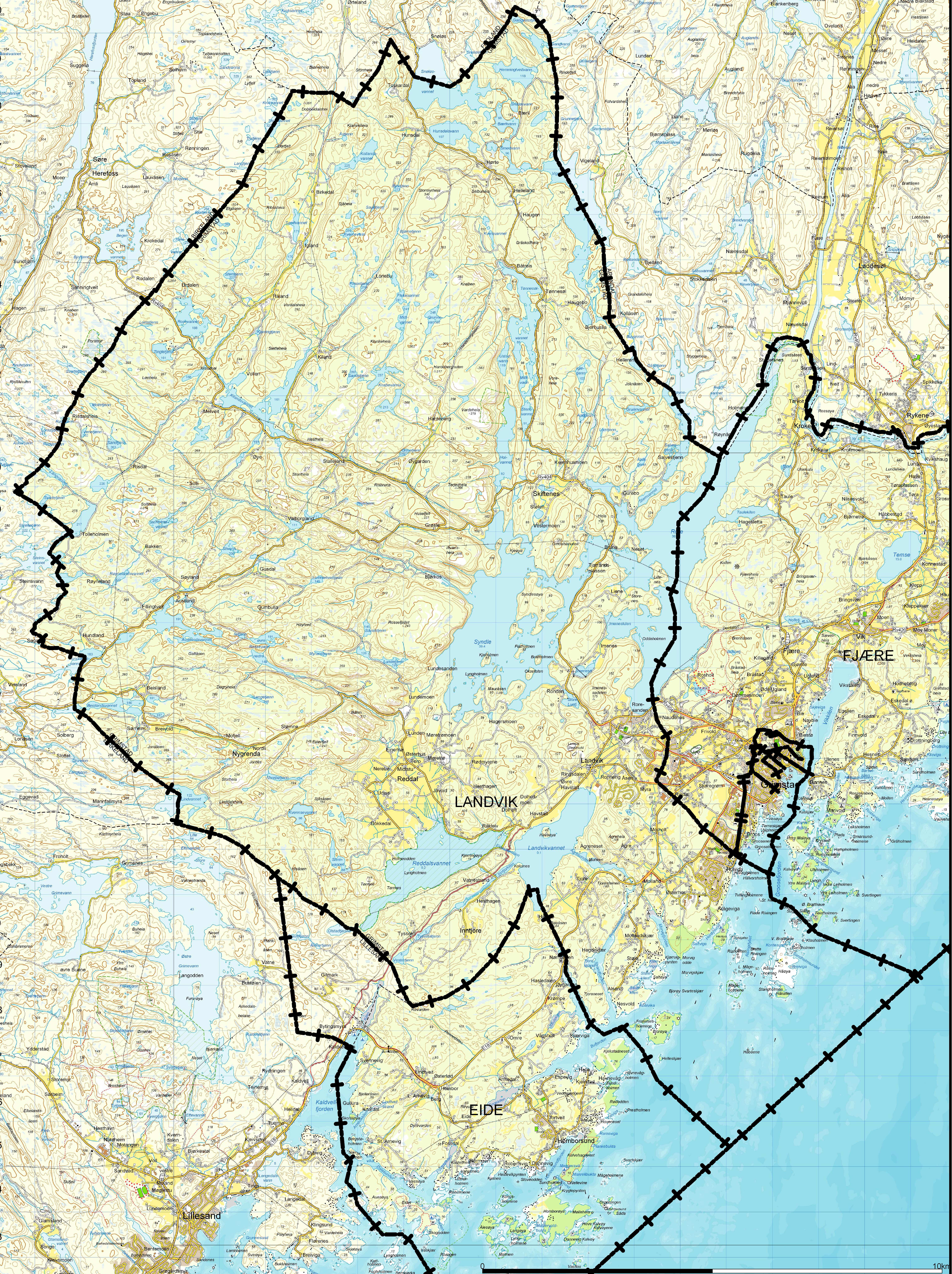 Landvik kommune - før sammenslåing med Grimstad i 1971.